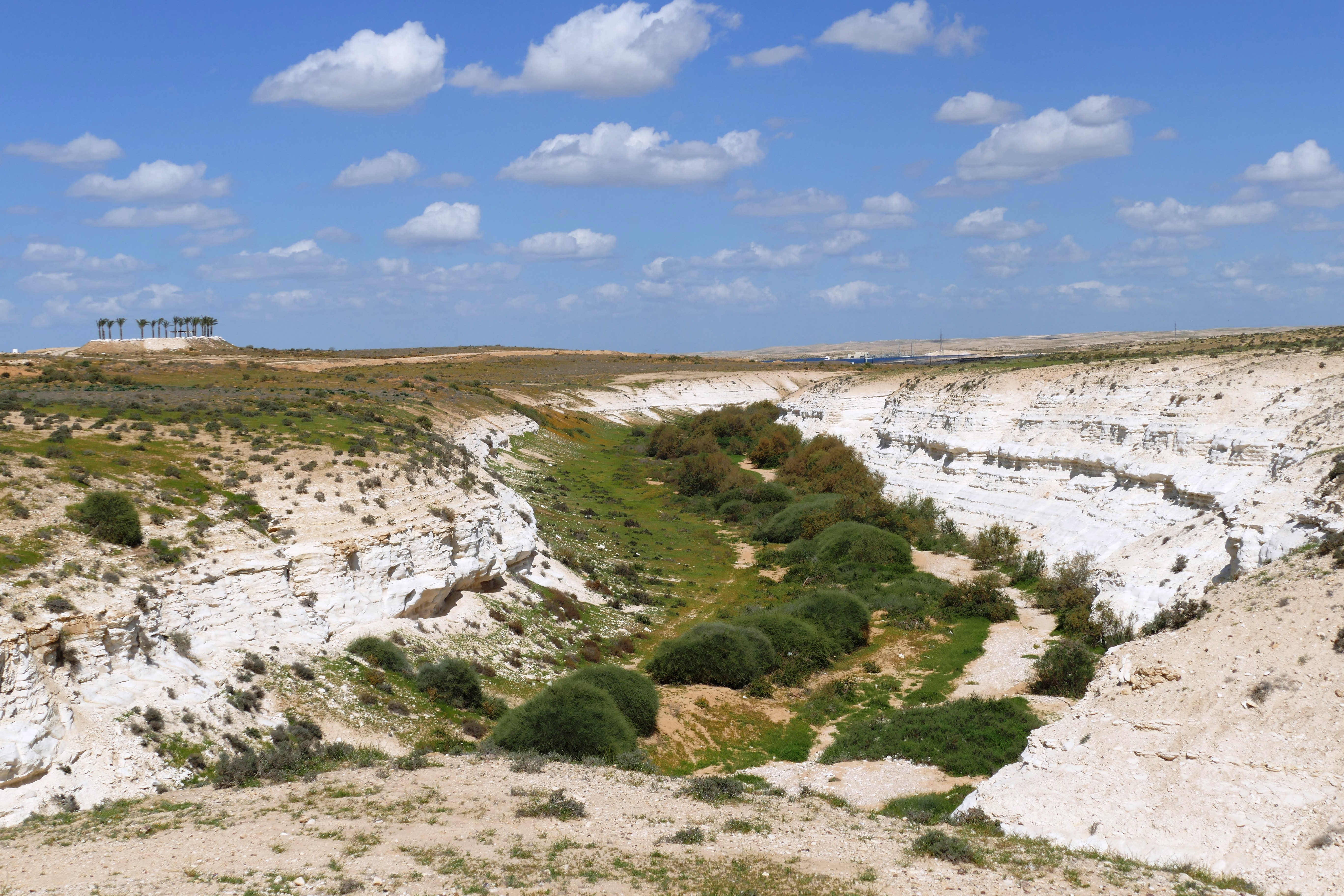 נחל סכר, נחל אכזב בנגב